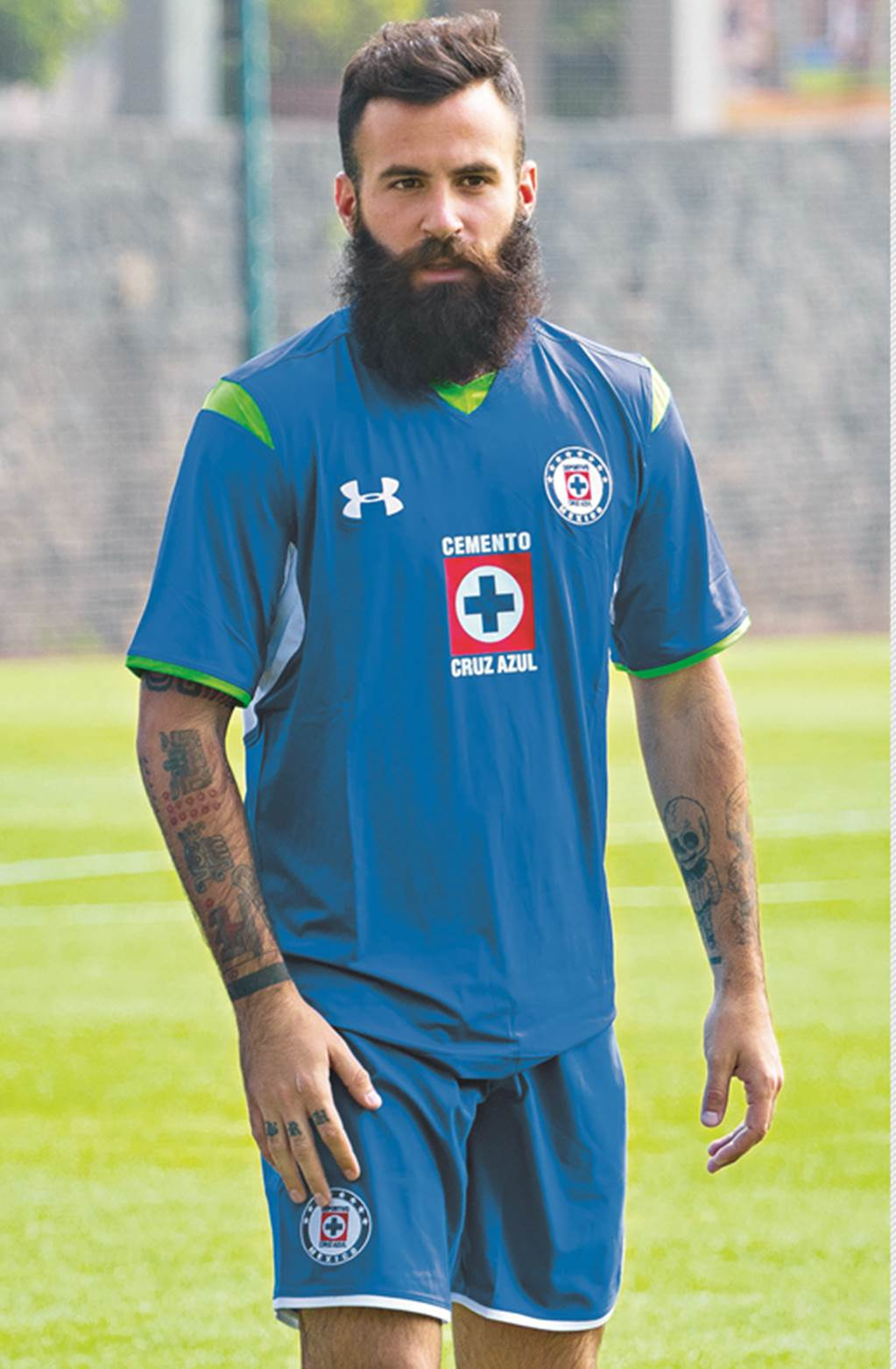 Marc Crosas con Cruz Azul